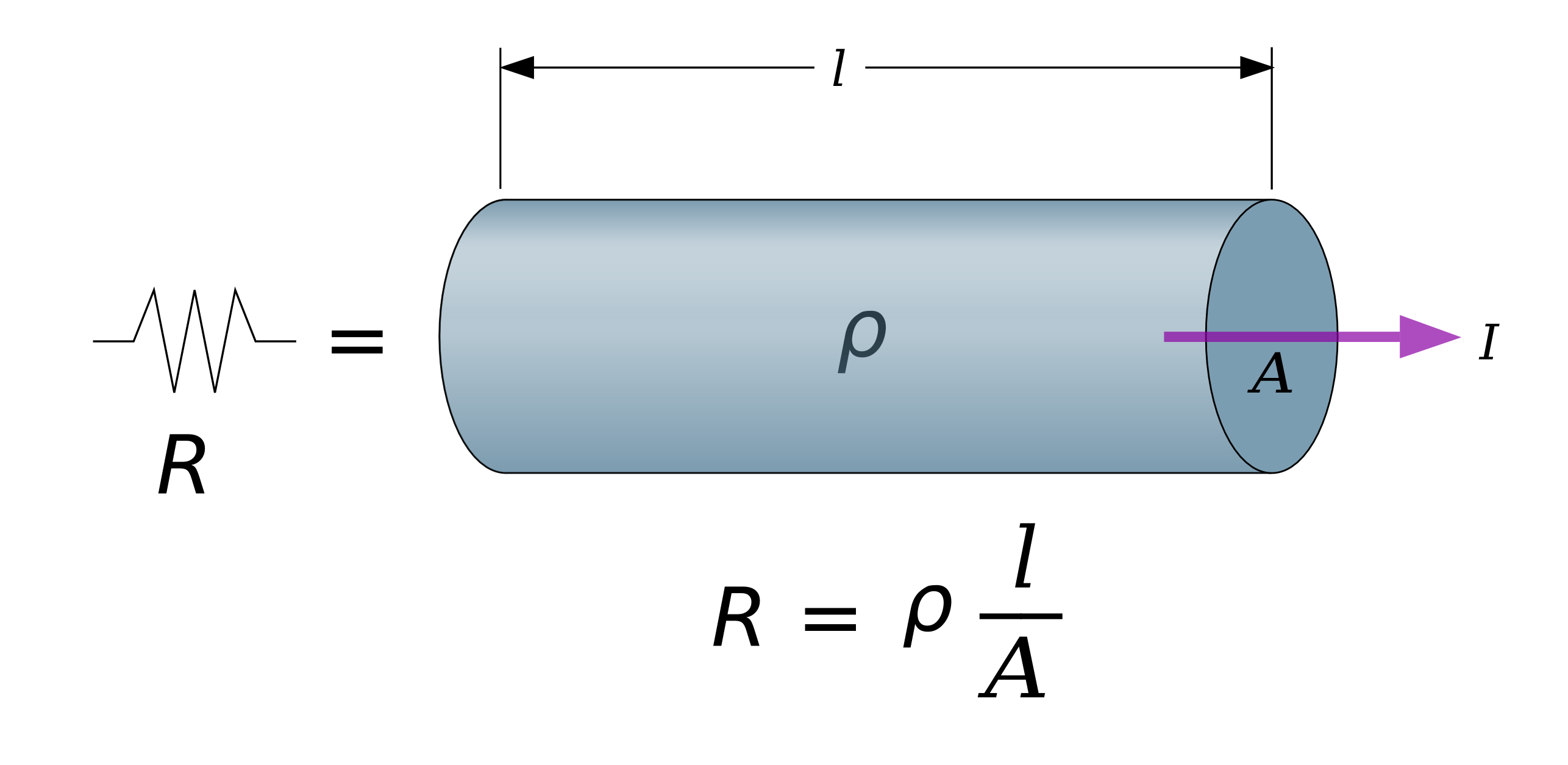 Representación de la resistencia de un conductor en función de su resistividad